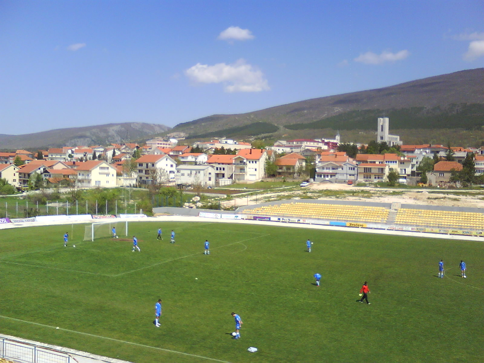 Mokri Dolac football stadium in Posušje